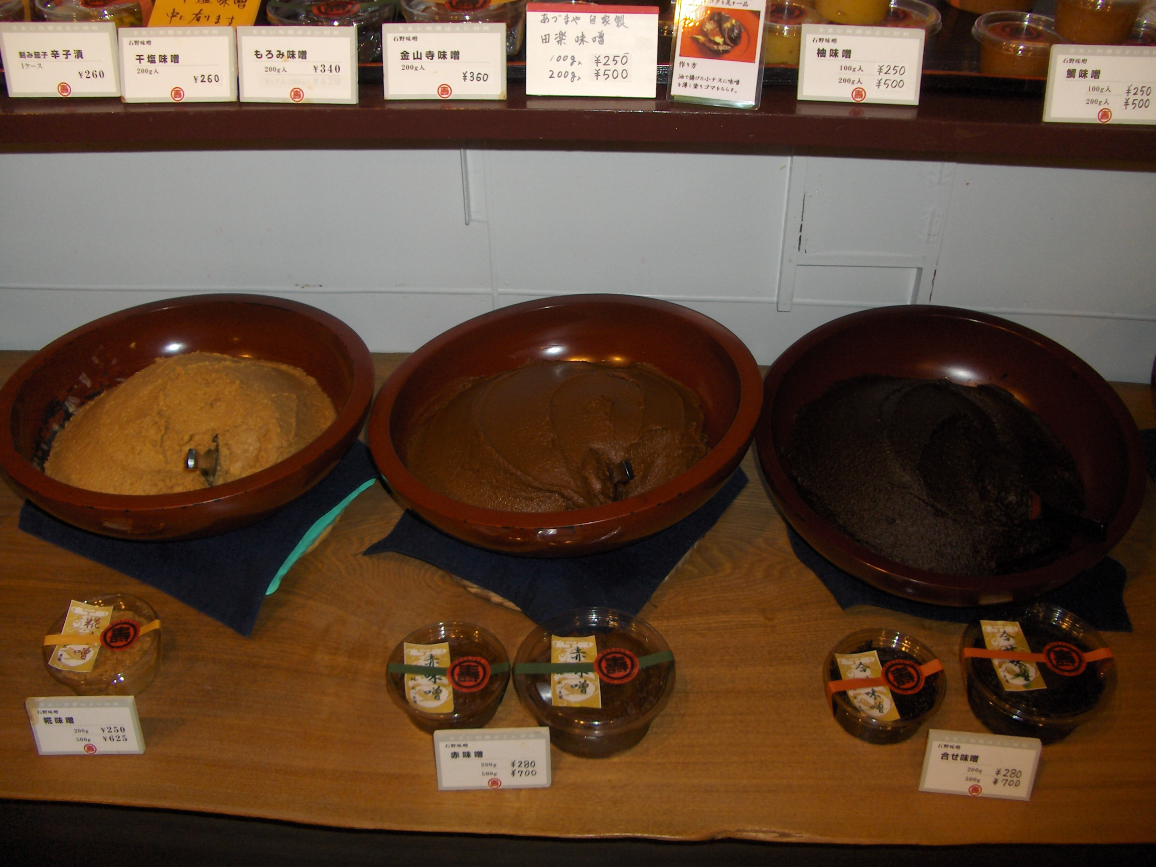 nishiki food market, kyoto, miso paste